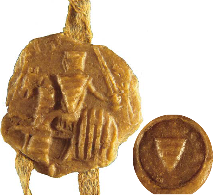 cf le titre.